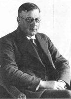 Mads Andreas Jacobsen (1891–1944), færøysk bibliotekar, forfatter og politiker.